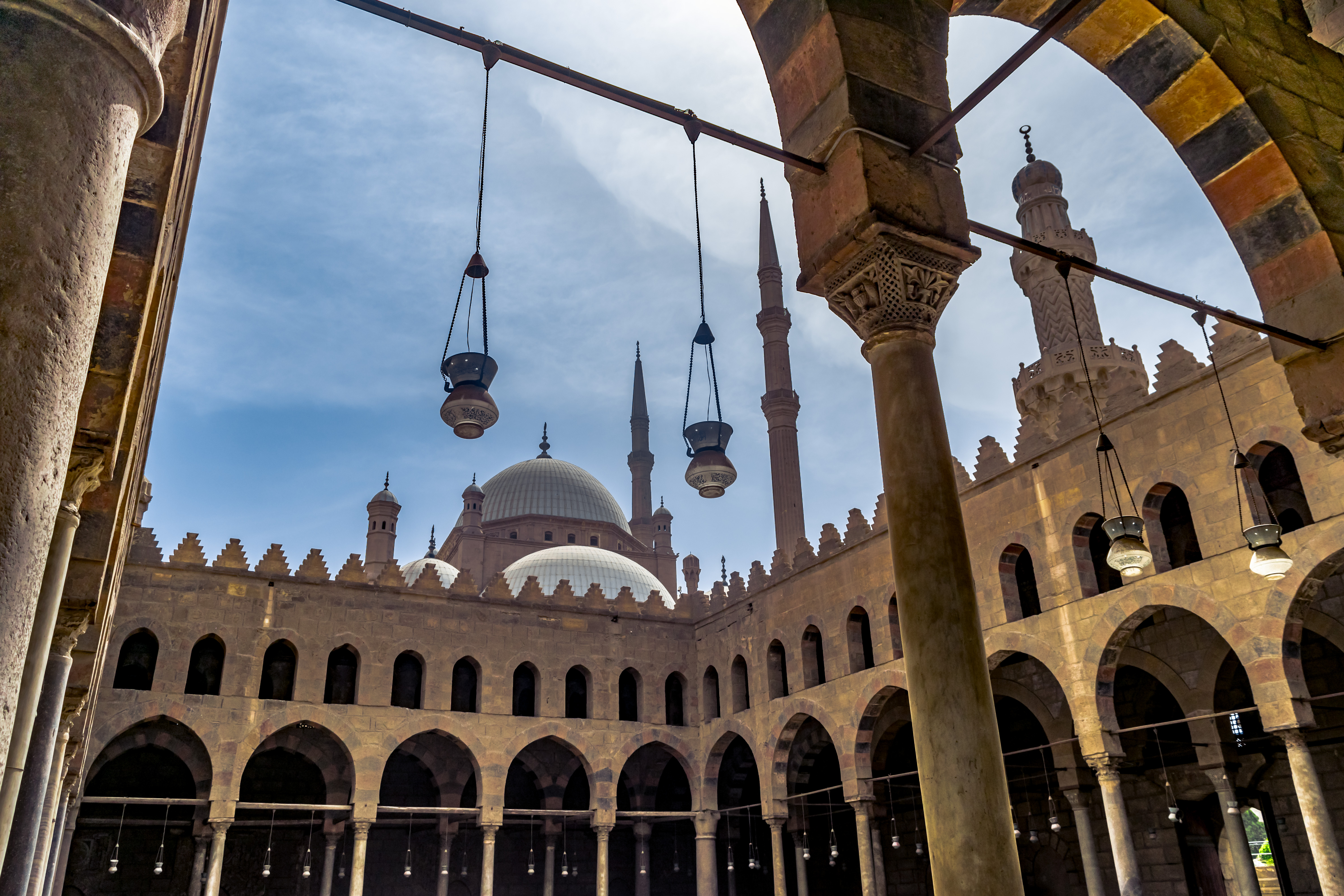 من داخل مسجد الناصر محمد بن قلاوون ويظهر بالصورة قبة مسجد محمد على